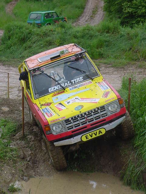 Autotrialbewerb vom Allrad Wien in Grafenbach (Ö). Hier sieht man sehr schön, dass präzises Fahren Voraussetzung ist.